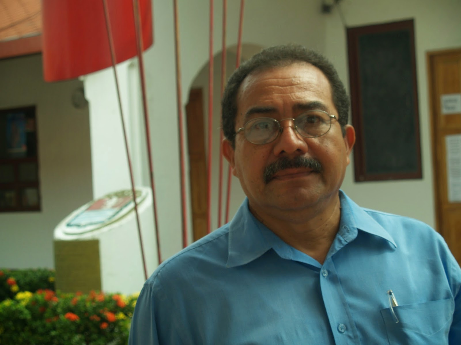 Profesor Carlos Posando